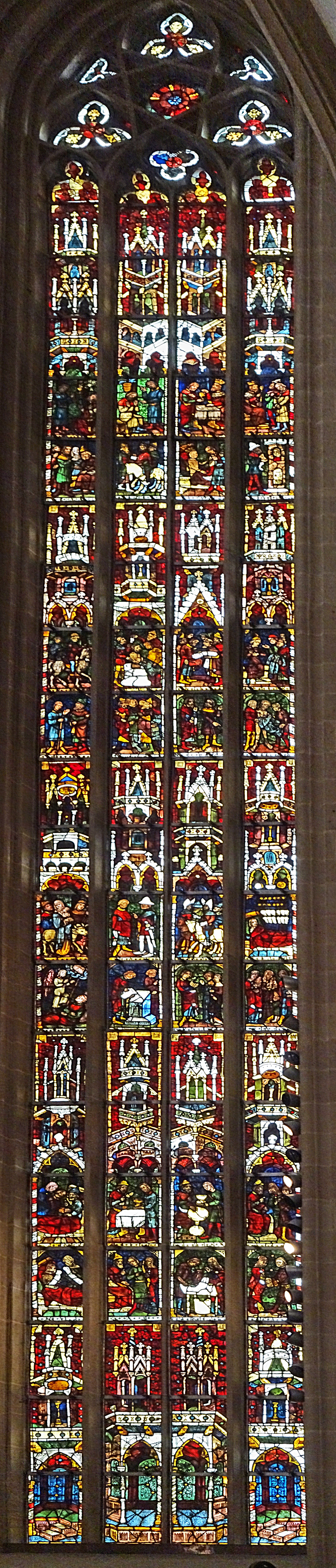 Jakobfenster (sIV) im Hohen Chor des Erfurter Doms St. Marien